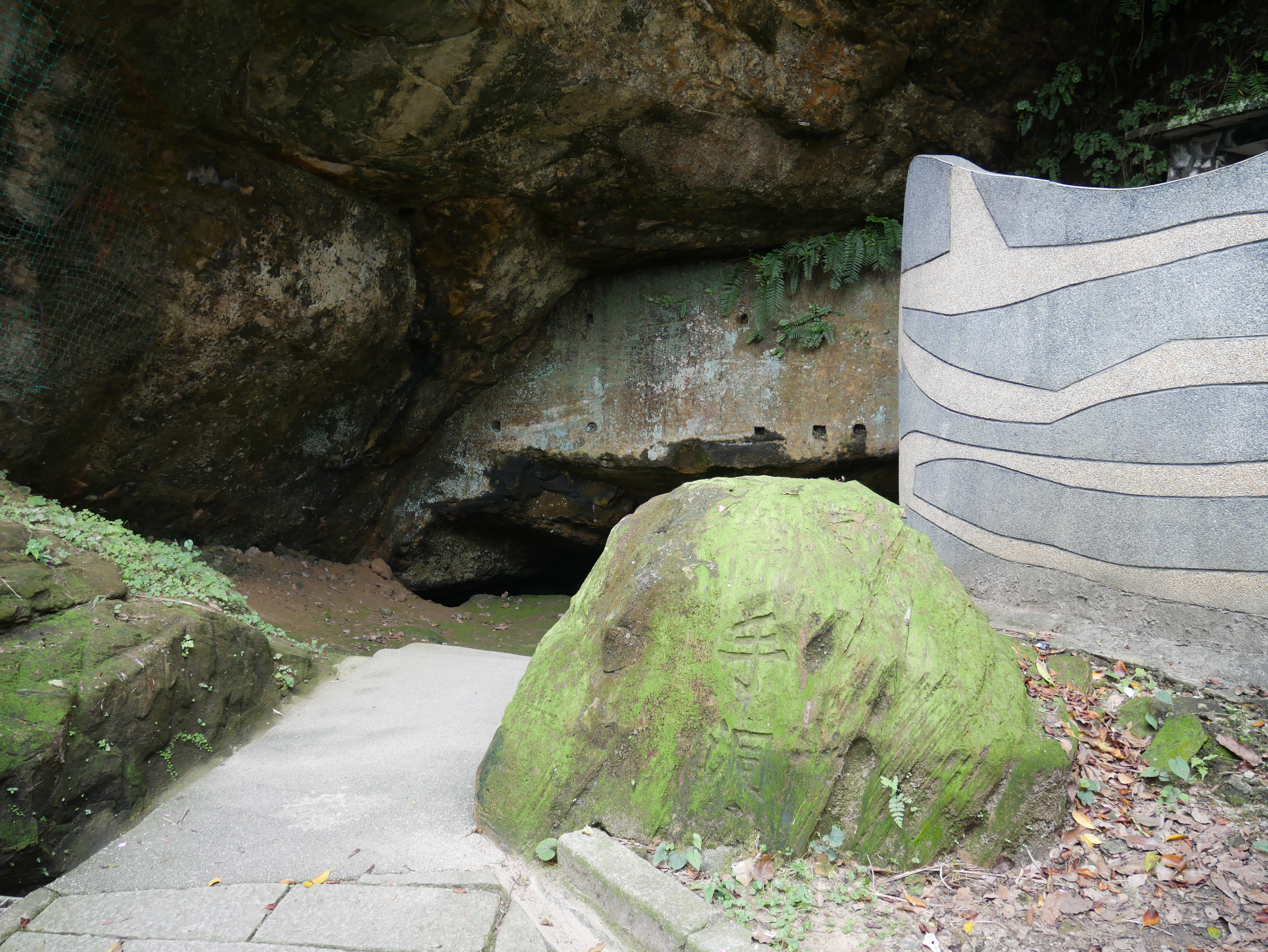 佛手洞入口，基隆市中山區仙洞里